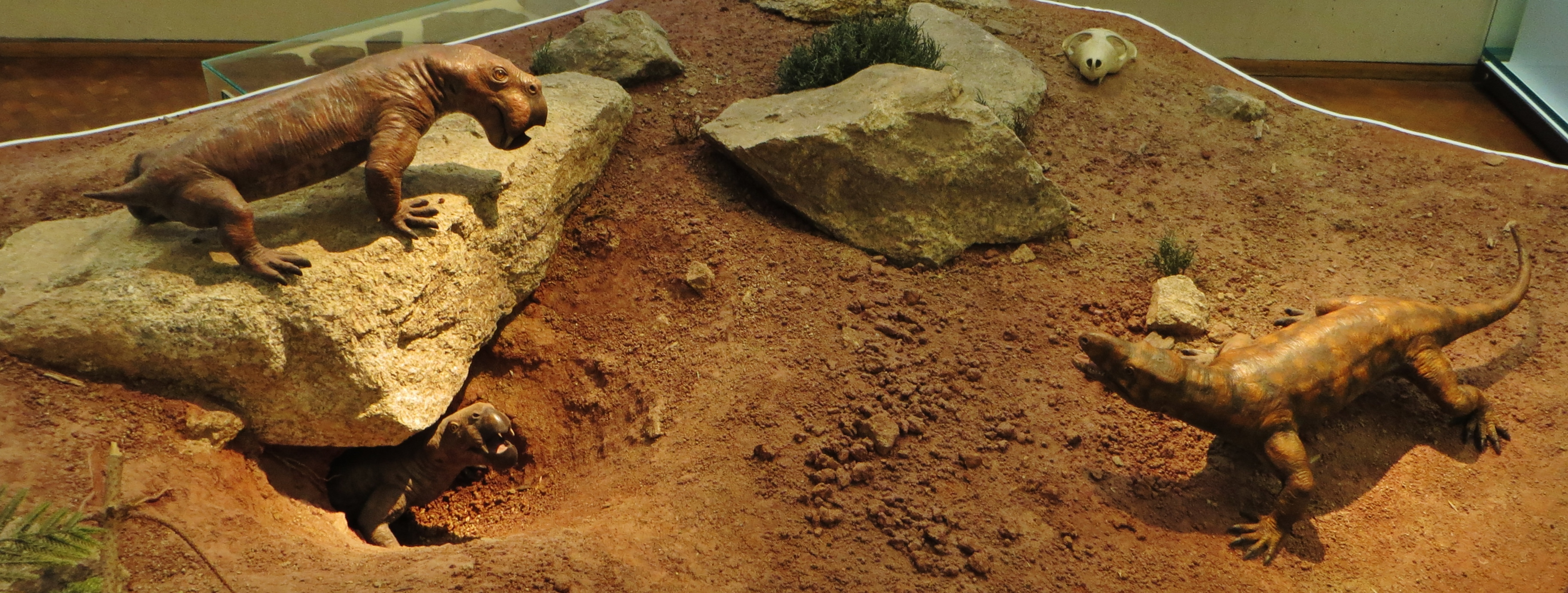 Models of therapsids - Took the picture at Museum am Lowentor, Stuttgard